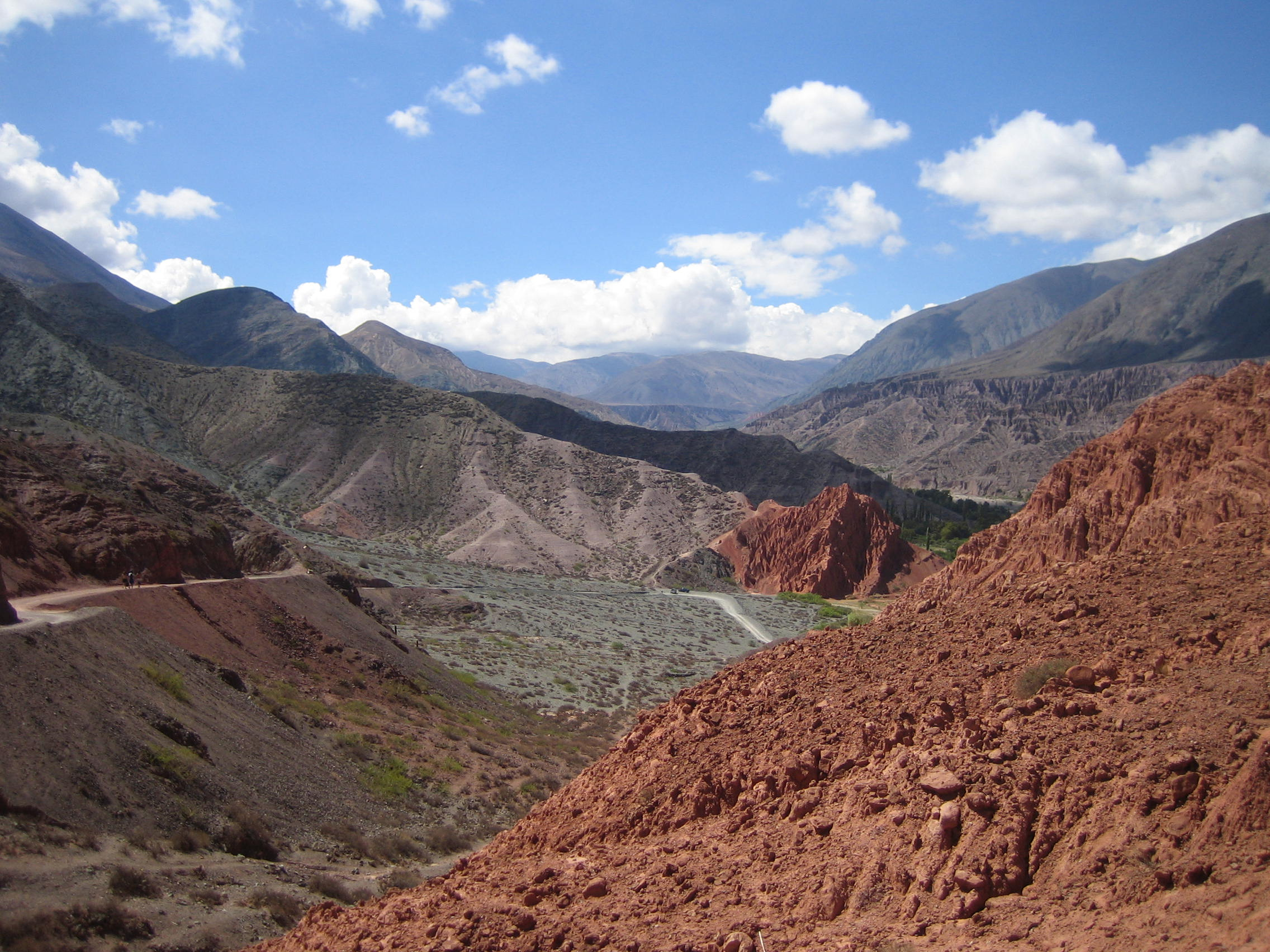 Gvh Argentine, montagne du Nord-ouest du pays